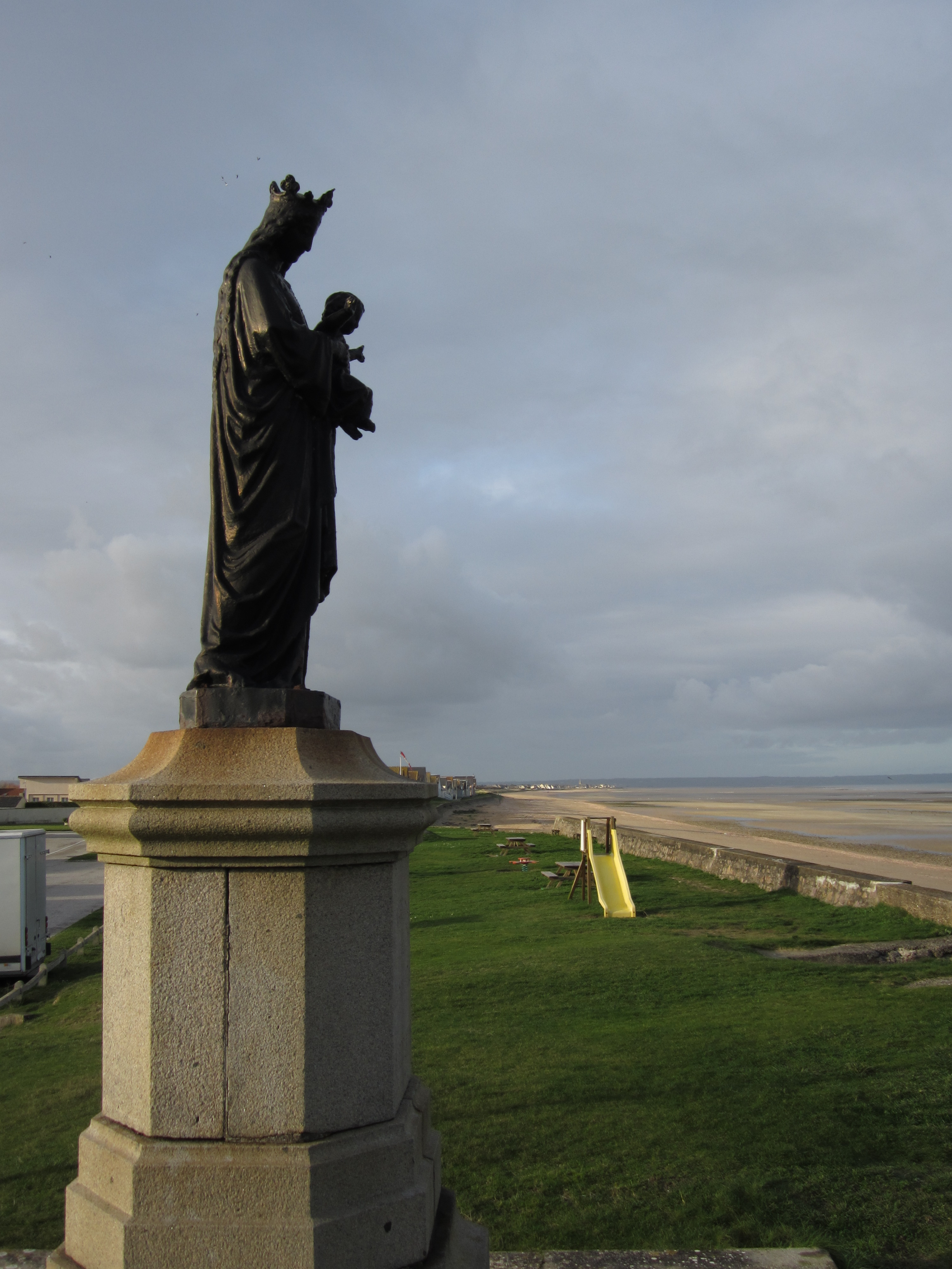 Ravenoville